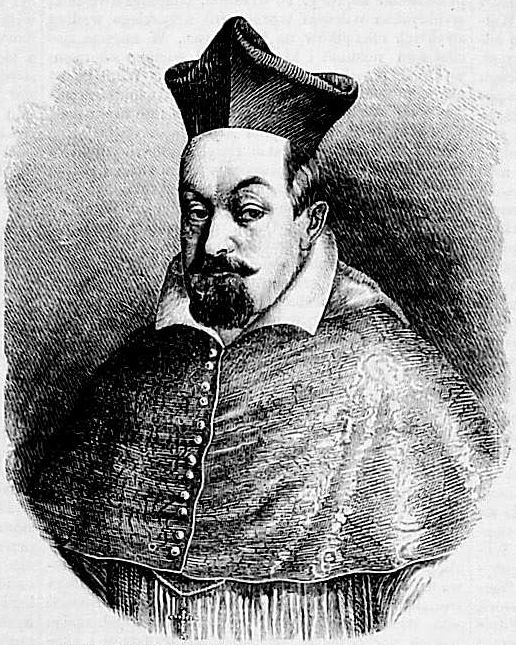 Bishop of Vilnus Eustachy Wołłowicz 1572-1630